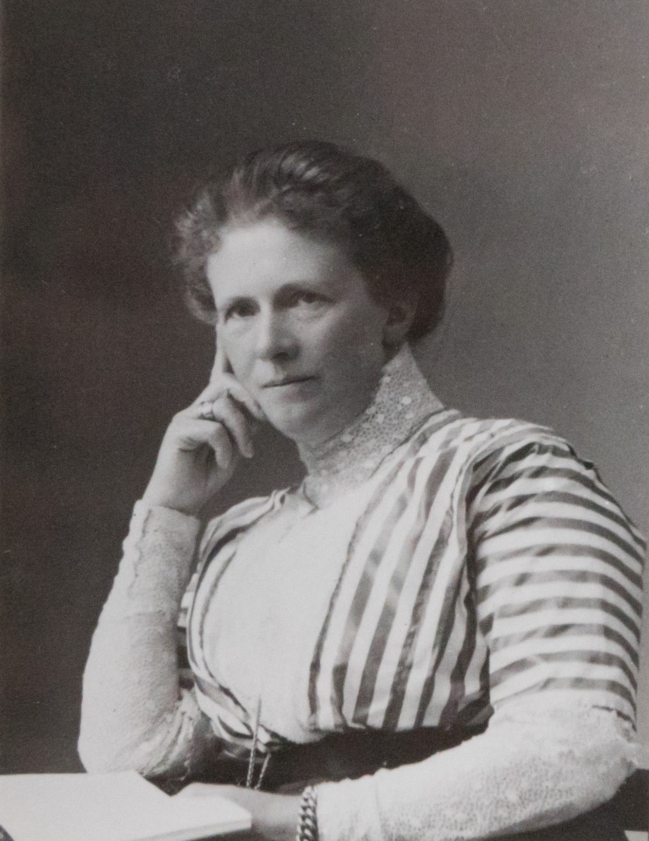 Rosa Christina Norström